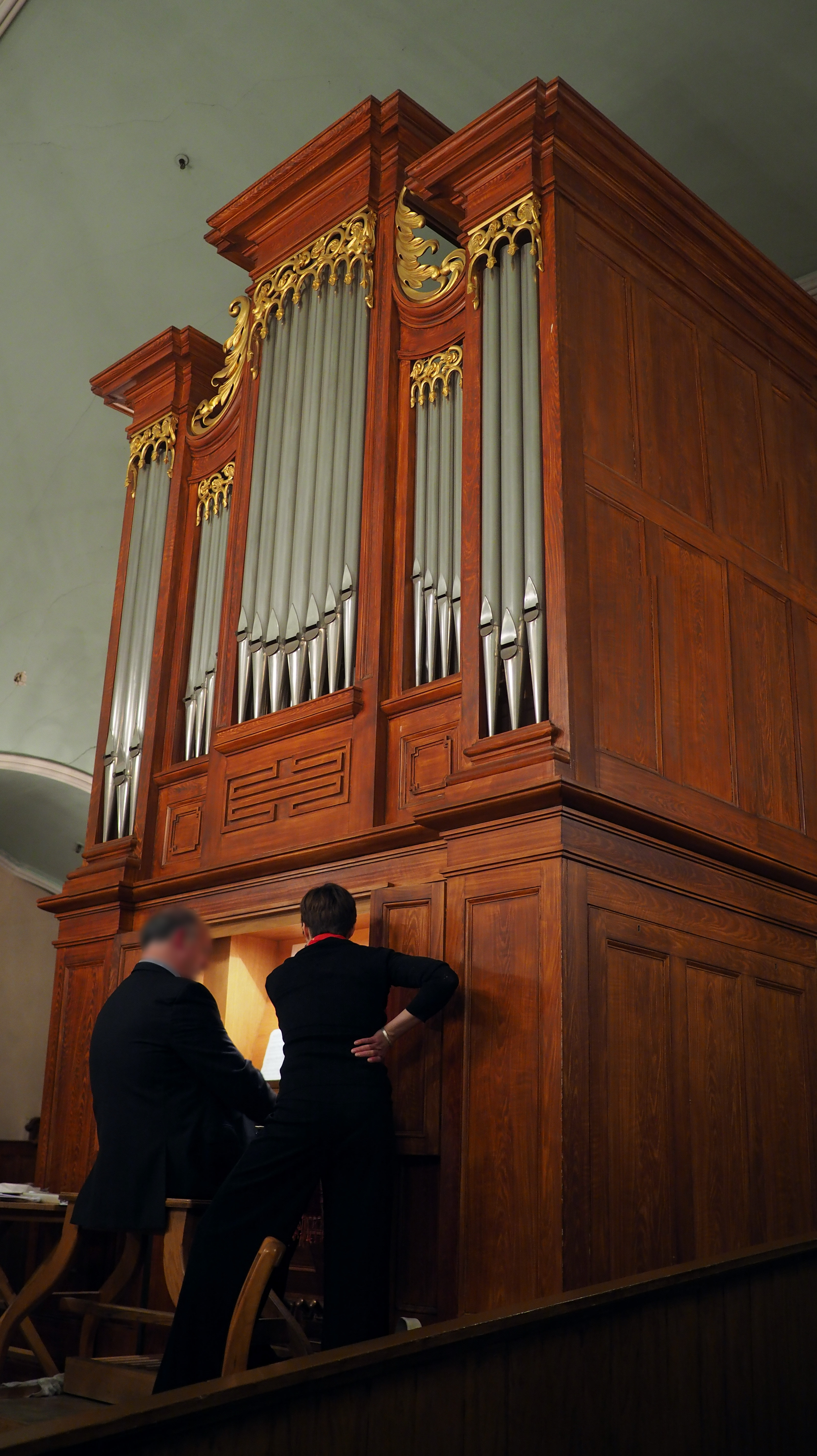 Orgue de l'église de la Visitation de la Bienheureuse-Vierge-Marie, Montréal. L'orgue original, datant des années 1800, fut probablement construit par Samuel Russel Warren, facteur de la Nouvelle-Angleterre établi à Montréal. Un nouvel instrument conserve les caractéristiques architecturales générales de l'ancien instrument. Une heureuse alliance entre les anciens et les nouveaux jeux confèrent à l'orgue un caractère unique.